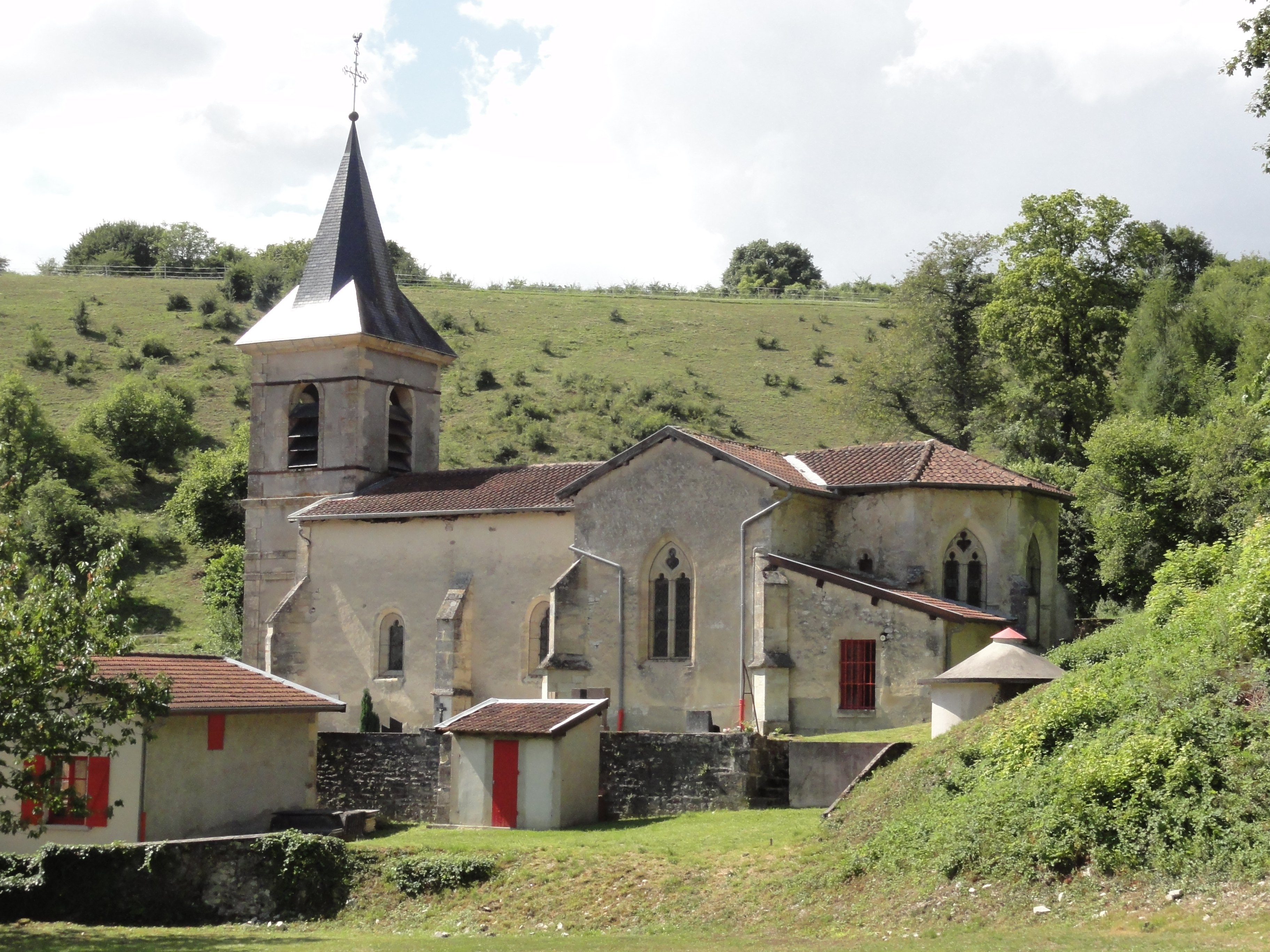 Géry (Meuse) église churches in meuse